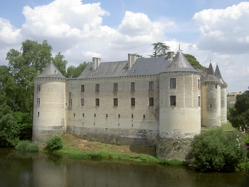 Château de la Guerche vu du pont - Touraine sud (Val de Loire)